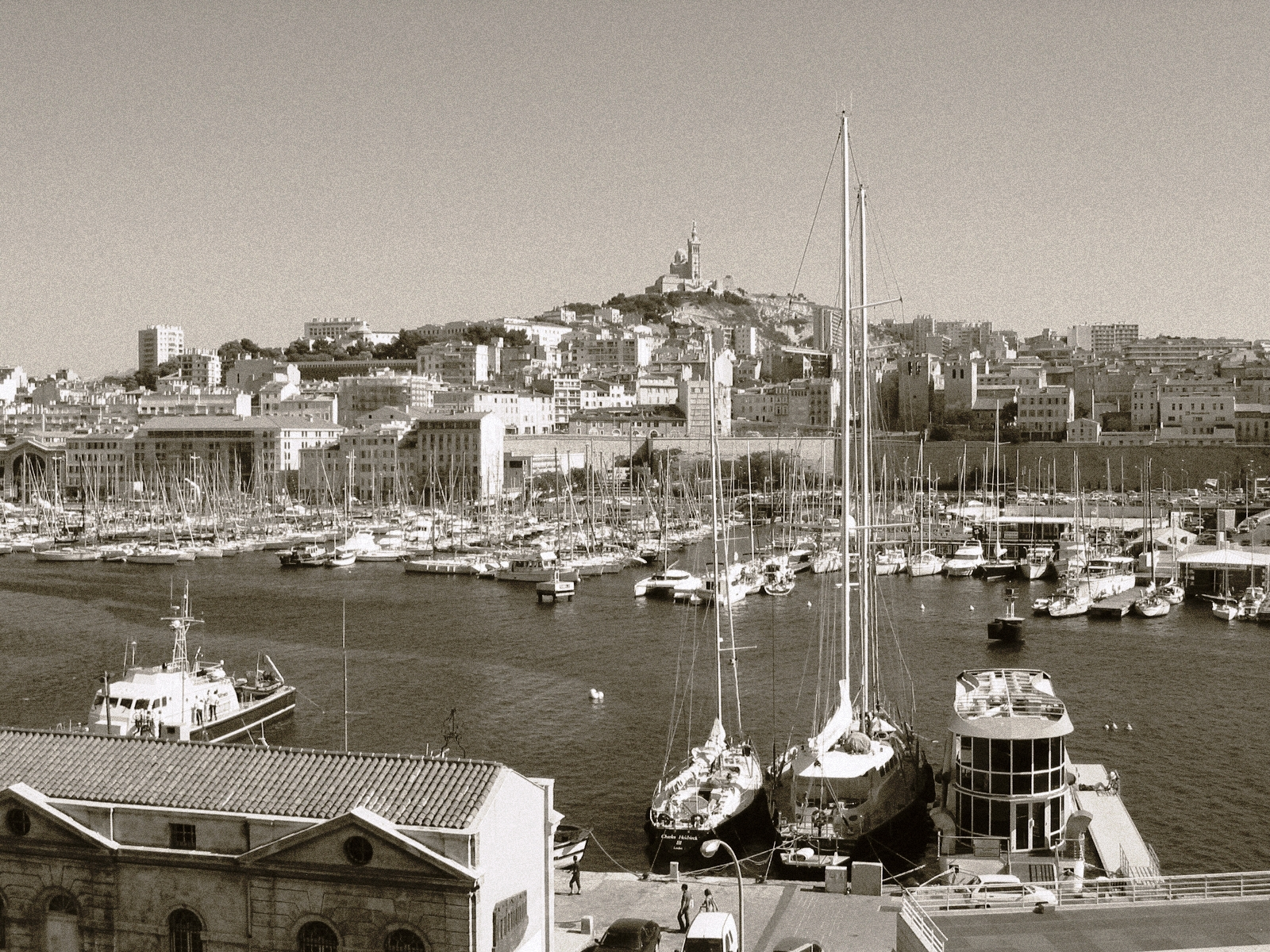 Vieux-Port de Marseille et Basilique Notre-Dame-de-la-Garde (France).